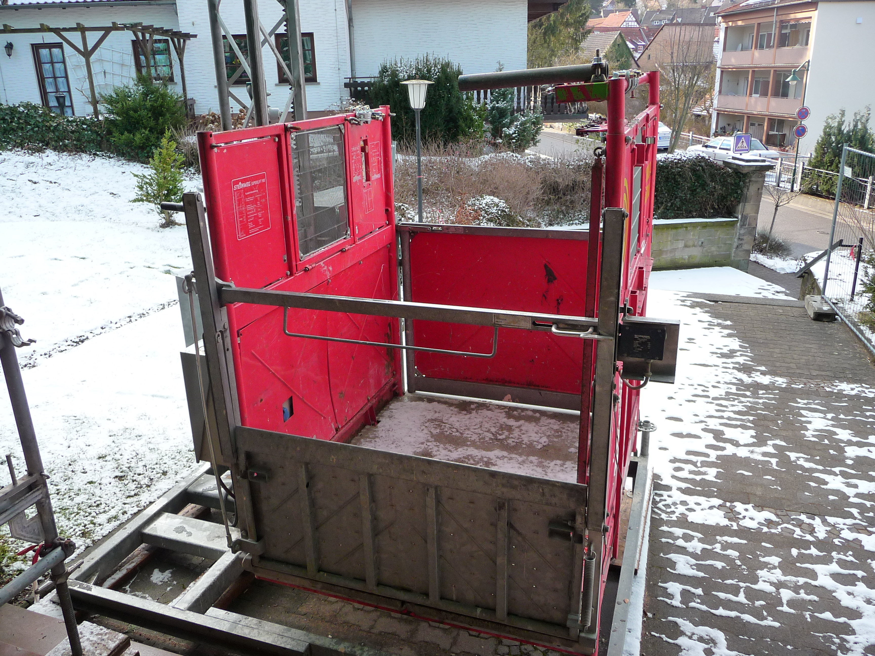 Baulastenaufzug (hier eingesetzt im Rahmen der Fassadenrenovierung der katholischen Kirche St. Ägidius in Kusel)